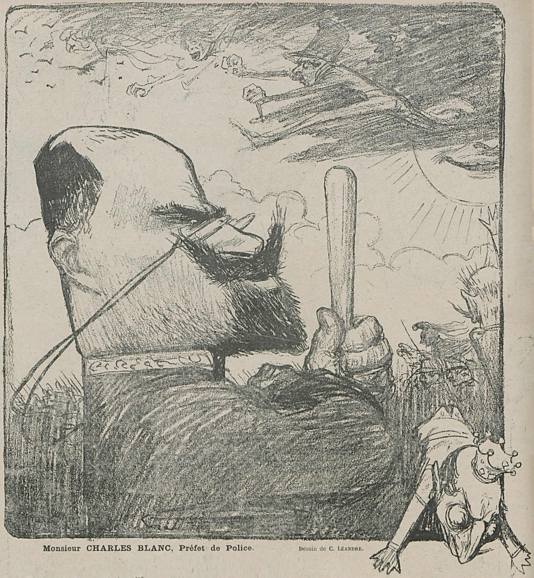 "Monsieur Charles Blanc, préfet de police."